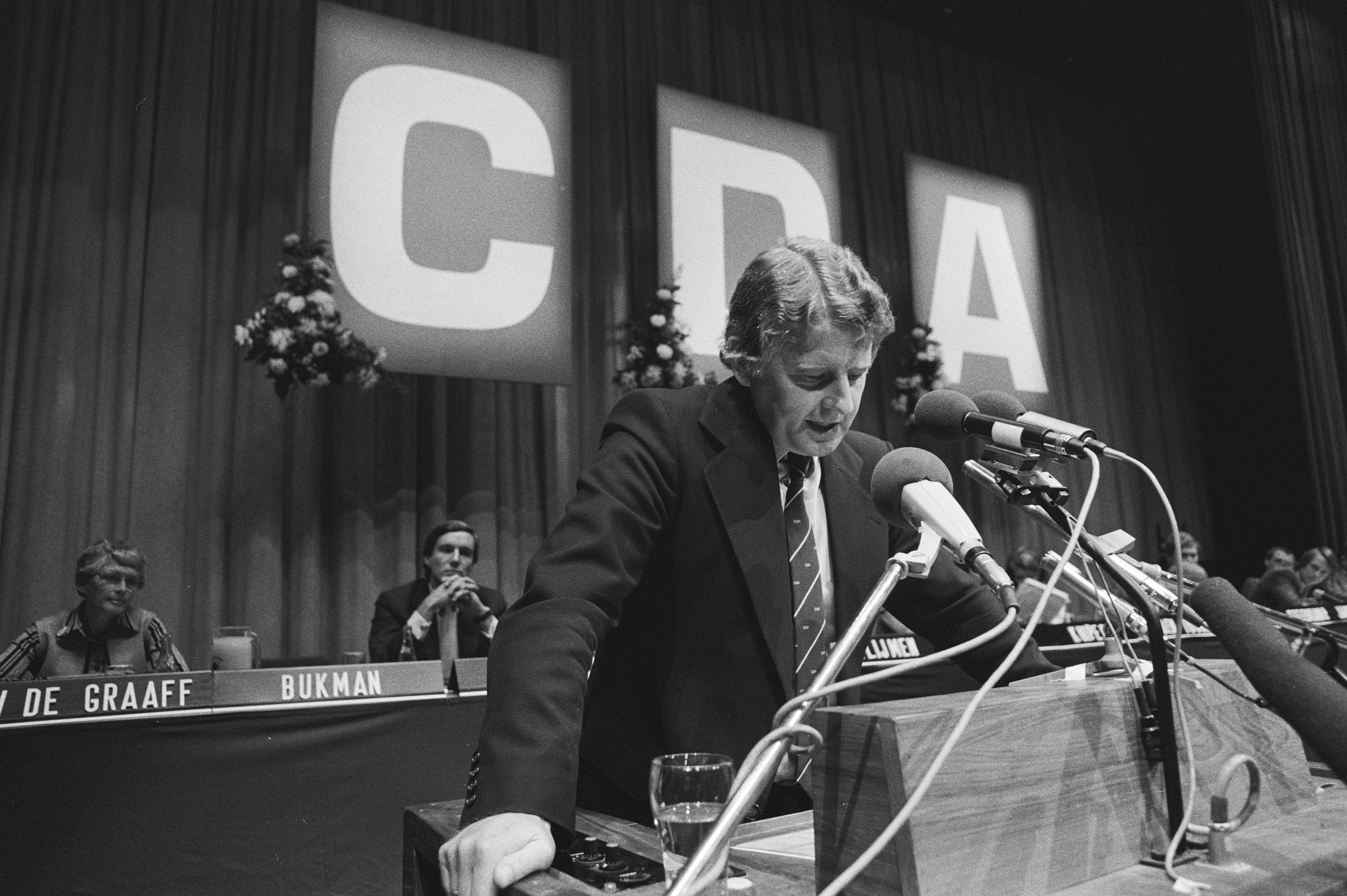 Fusie congres CDA in Den Haag: Bukman aan het woord